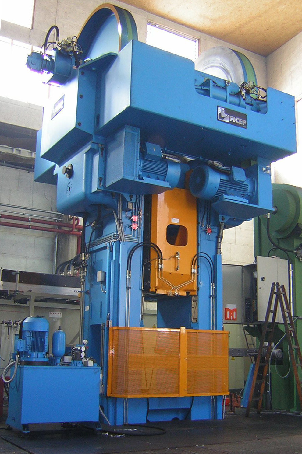 Reibradspindelpresse